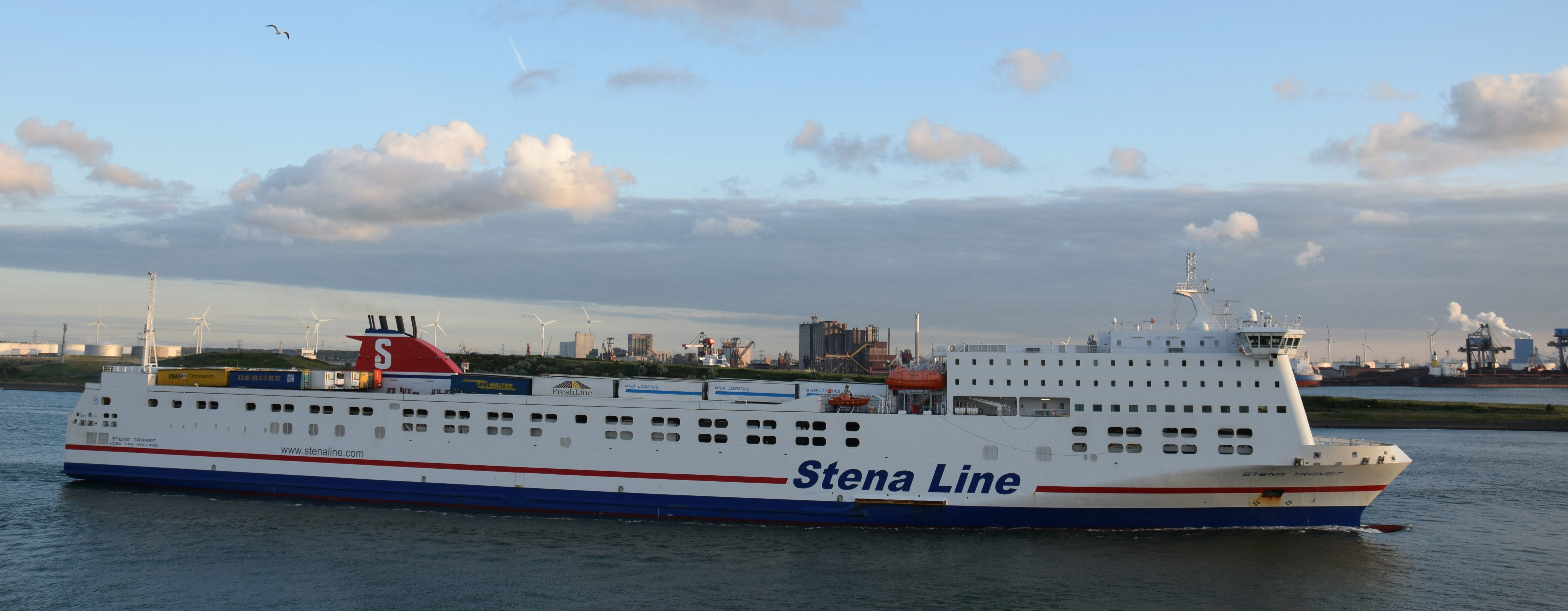 Die Stena Transit am 20.6.2014 in Hoek van Holland